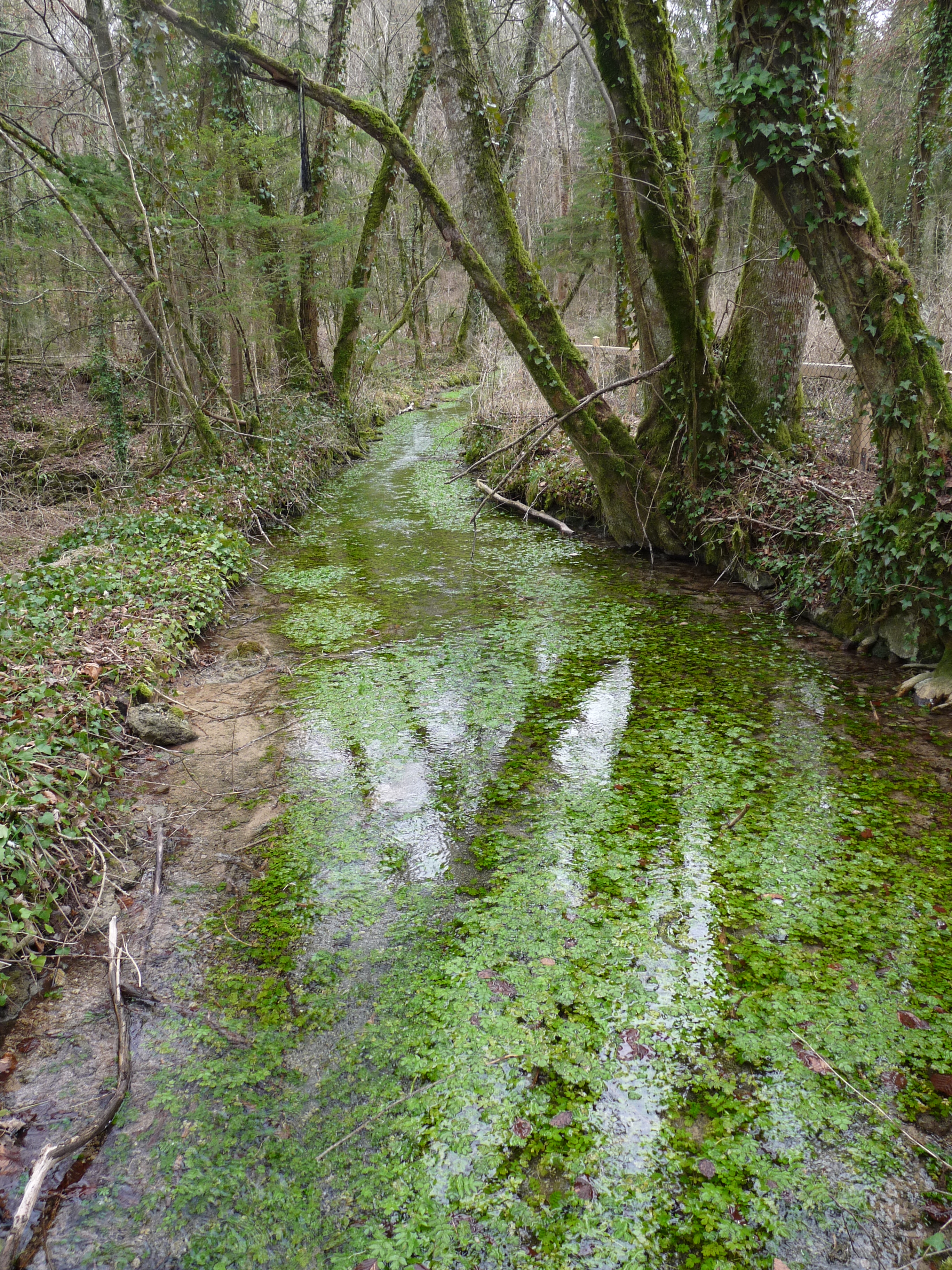 Tufière de Rolampont (Haute-Marne)